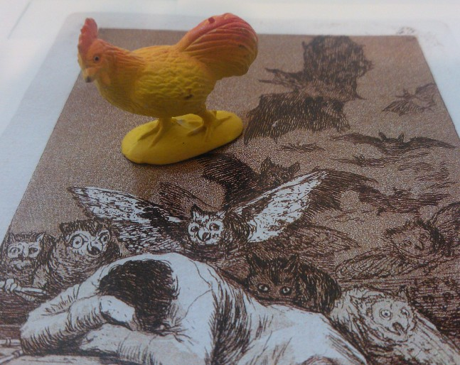 Composición propia; foto, tomada con un móvil (existe otra toma, también subida a los comunes hecha con una cámara digital muy sencilla, o sea barata). Incluye vista parcial de un grabado de Goya (titulado: "el sueño de la razón produce monstruos" y en dominio público pues el autor murió hace más de 100 años; Goya era grabador, además de pintor), y un gallo de caucho o plástico, de los que vendían en los puestos de figuritas de Navidad y ahora en los "chinos". Estaba en casa, entre los juguetes de mi nieto, ignoro su origen exacto. Autor: Tolijote